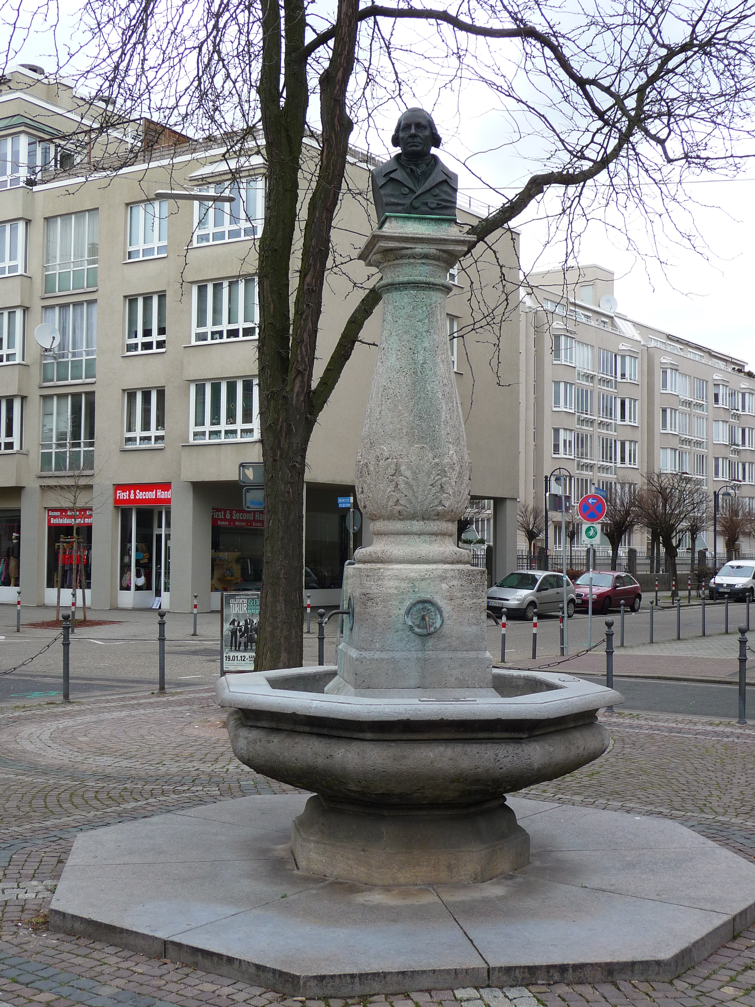 Lidell-Brunnen am Lidellplatz in Karlsruhe (Baden-Württemberg, Deutschland)